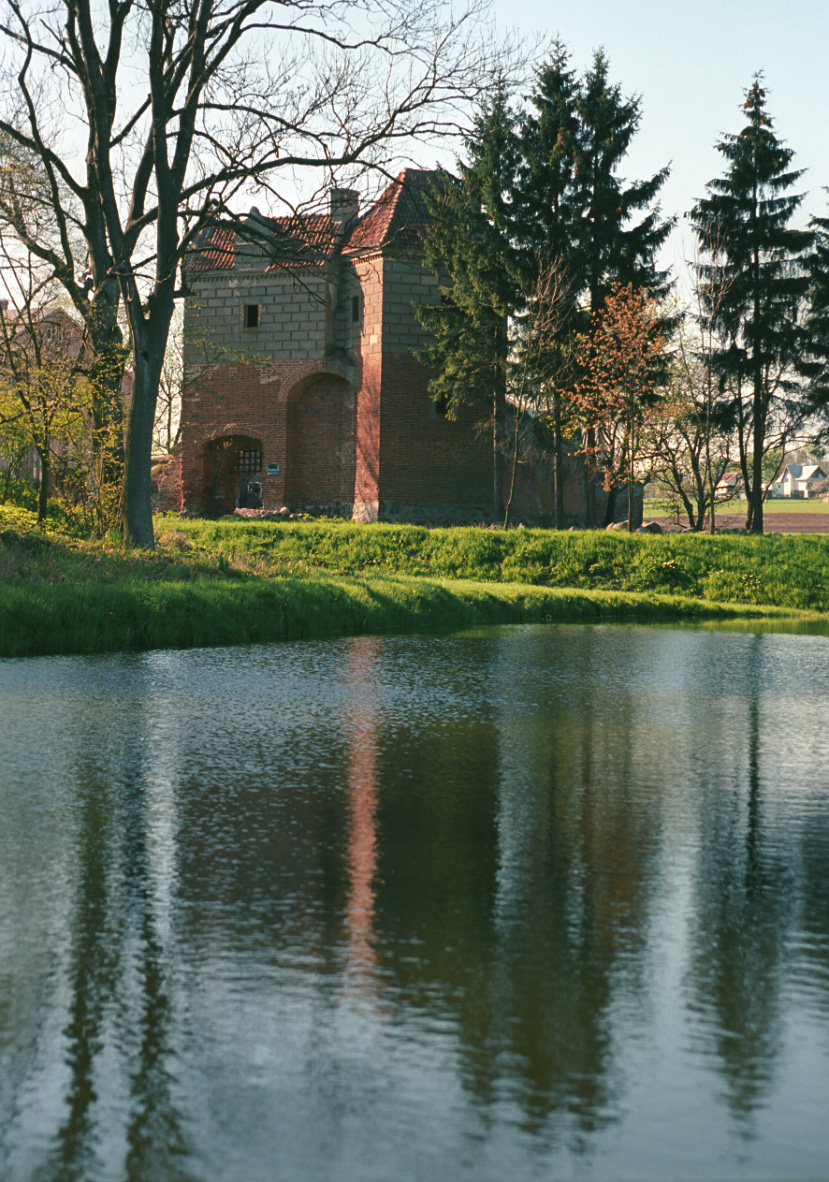 Zamek Kiszewski - budynek bramny, XIV, XVII